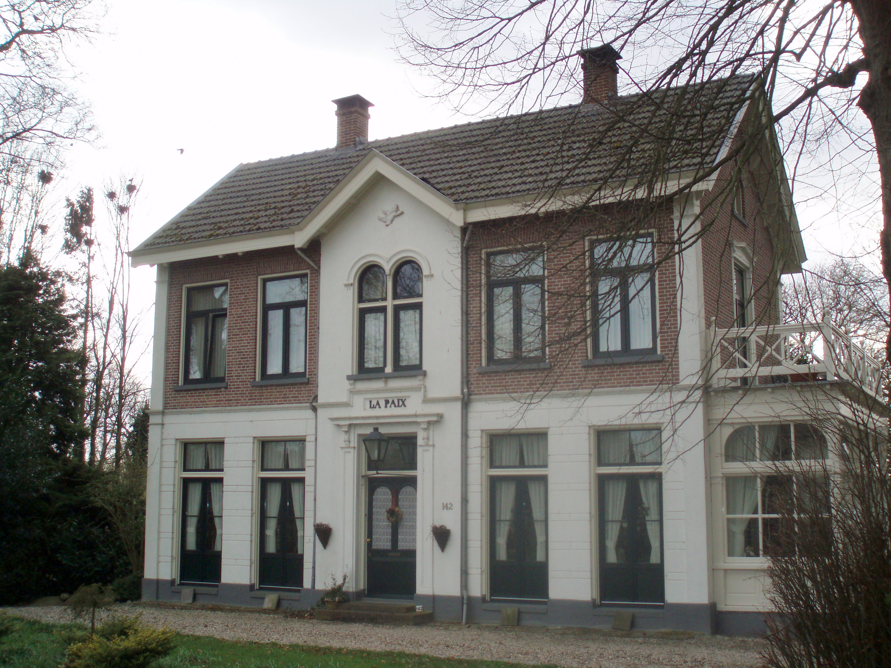 Landhuis La Paix in Nieuw-Amsterdam dat gebouwd werd voor Lodewijk Bernardus Johannes Dommers.